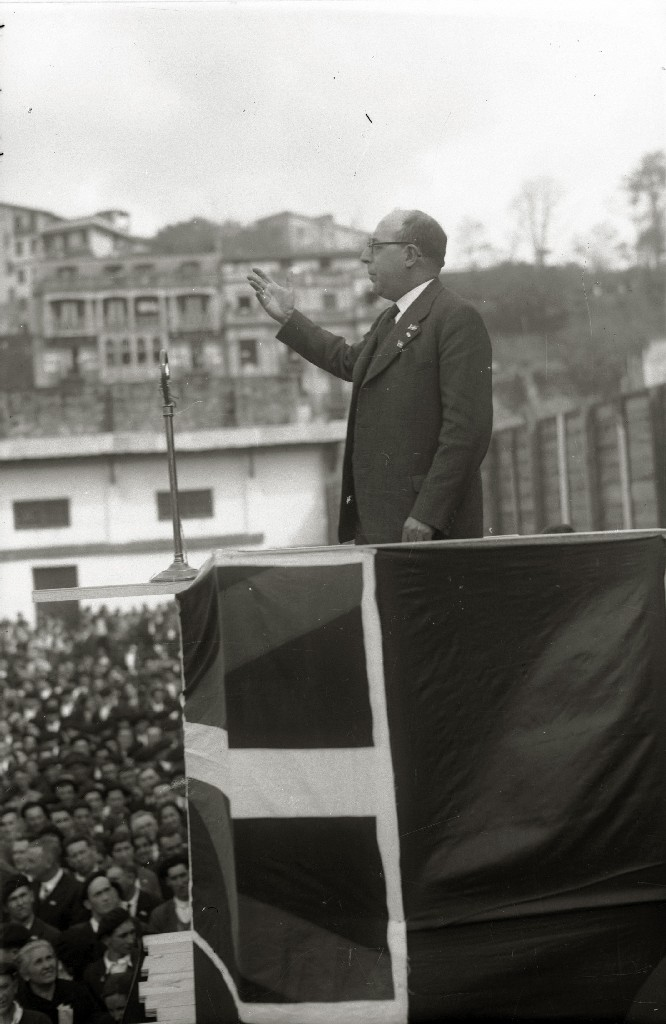 Ramón Otero Pedrayo en el Aberri Eguna organizado por EAJ-PNV en el antiguo frontón Maitea de Atotxa en abril de 1933 en San Sebastián. Otero Pedrayo fue uno de los asistentes al Aberri Eguna de 1933, celebrado en el frontón Maitea, en Atocha, junto con Ewald Ammende (Secretario del Consejo de Minorías Nacionales, de Ginebra), Francesc Maspons (Partit Nacionalista Catalá), Manuel Carrasco i Formiguera (Unió Democratica de Catalunya). El original pertenece a Kutxa Fototeka y se puede consultar en la web así como en